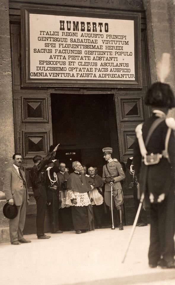 Il Principe Umberto incontra le autorità religiose davanti al portale ligneo del Duomo